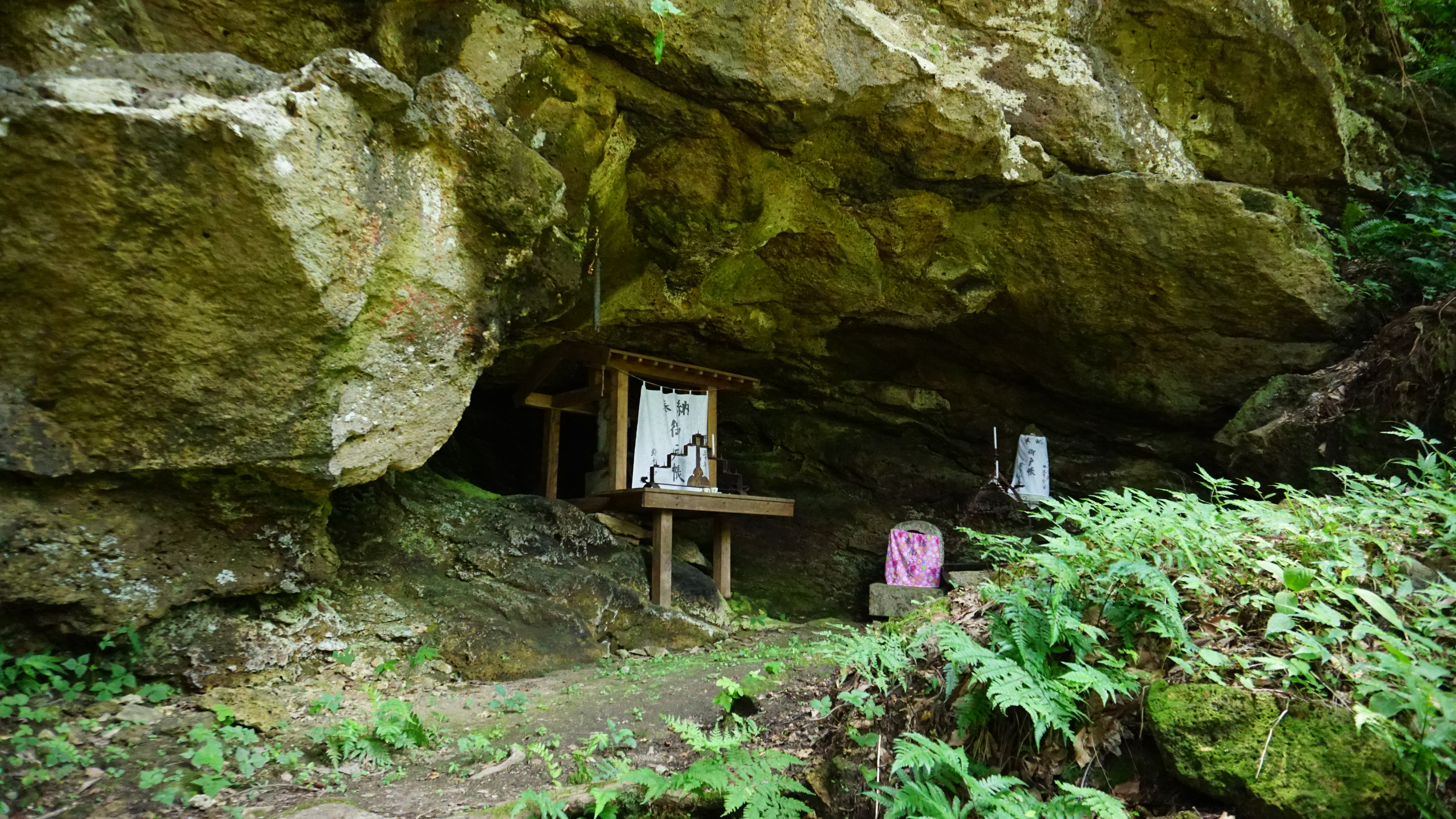 岩井堂洞窟遺跡（秋田県湯沢市）。縄文時代の岩陰遺跡である。